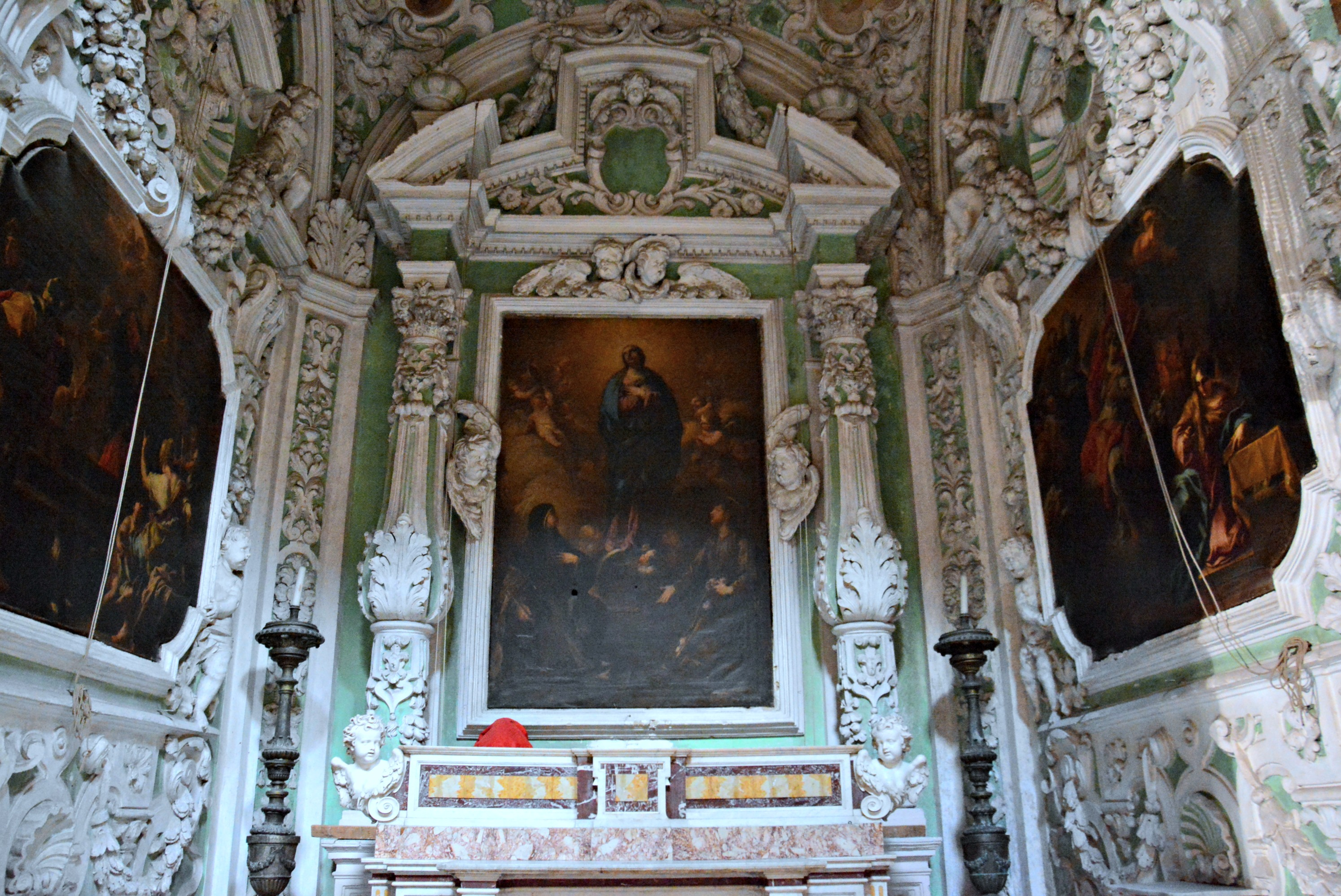 Vedi titolo